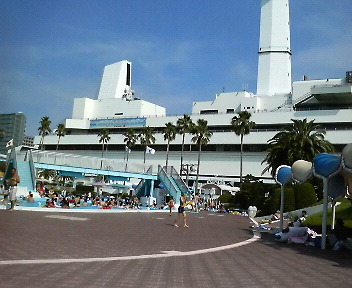 遊泳プールで遊ぶ人々